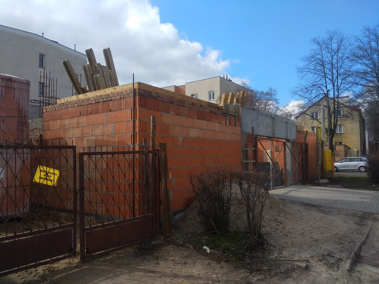 Budowa bloku przy Reymonta (2020 r.)